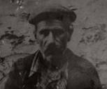 Христос Трандос